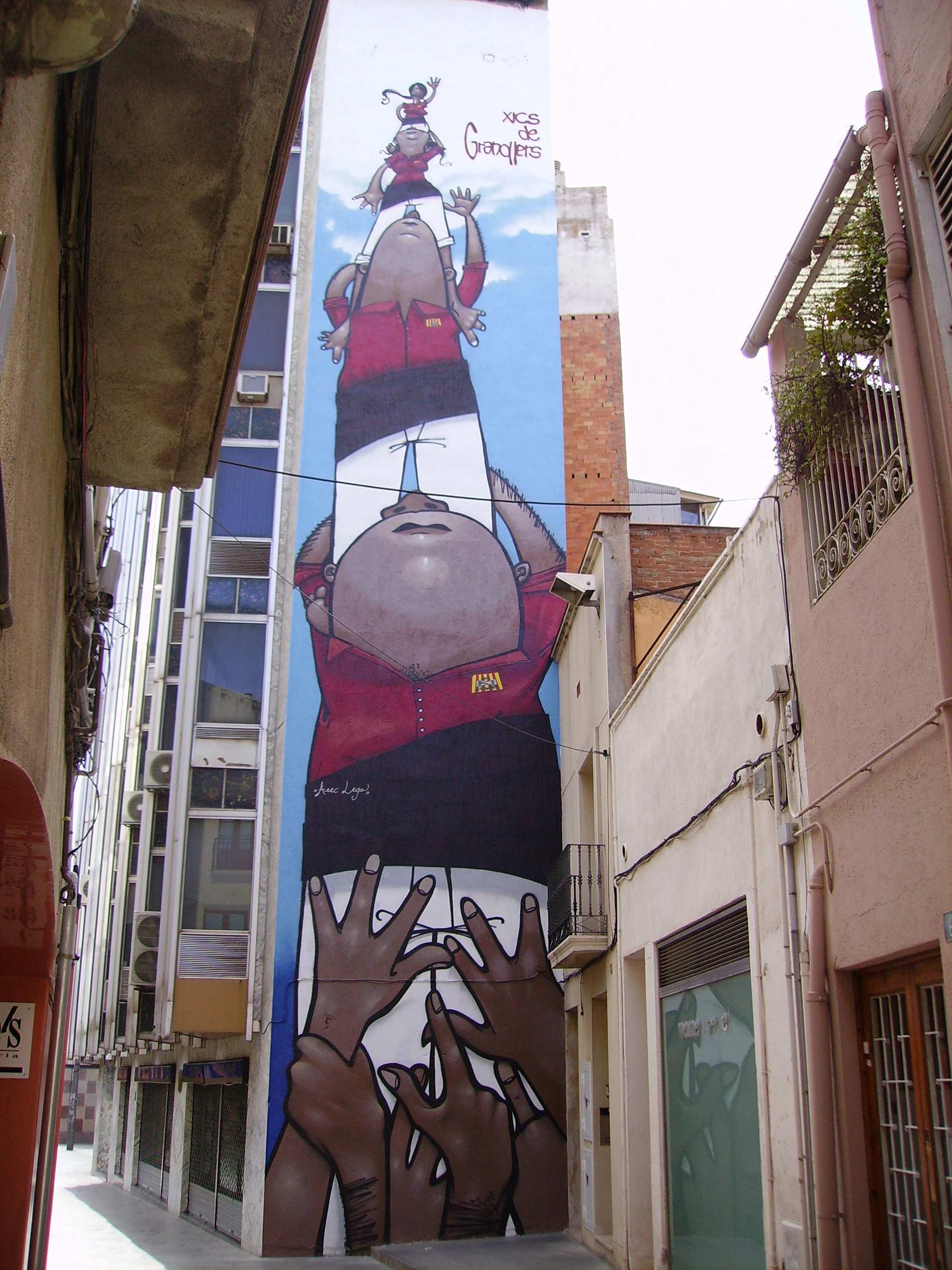 Mural dels Xics de Granollers, Vallès Oriental, Catalunya. Creat per Guillem Cebollada i Jordi Casanovas, té unes dimensions de 4 metres d'ample i 22 d'alçada.